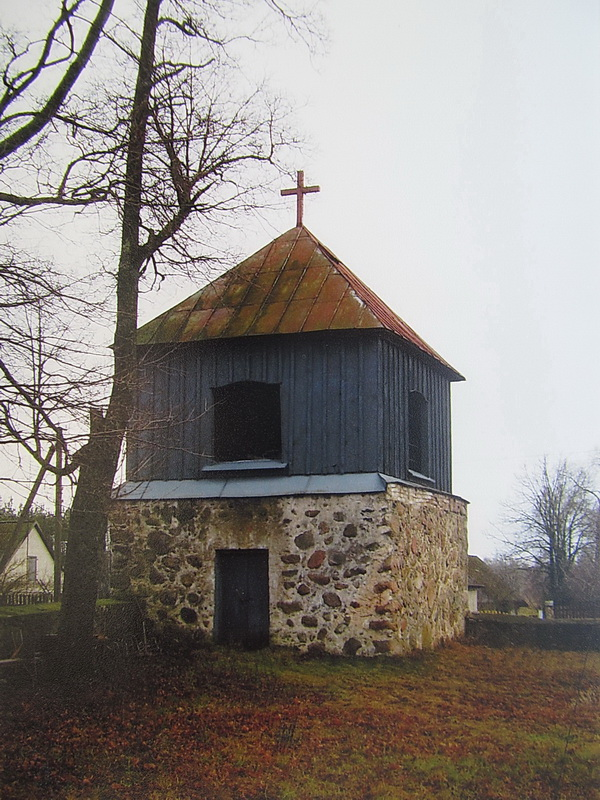 Воўпа. Касцёл. Званіца